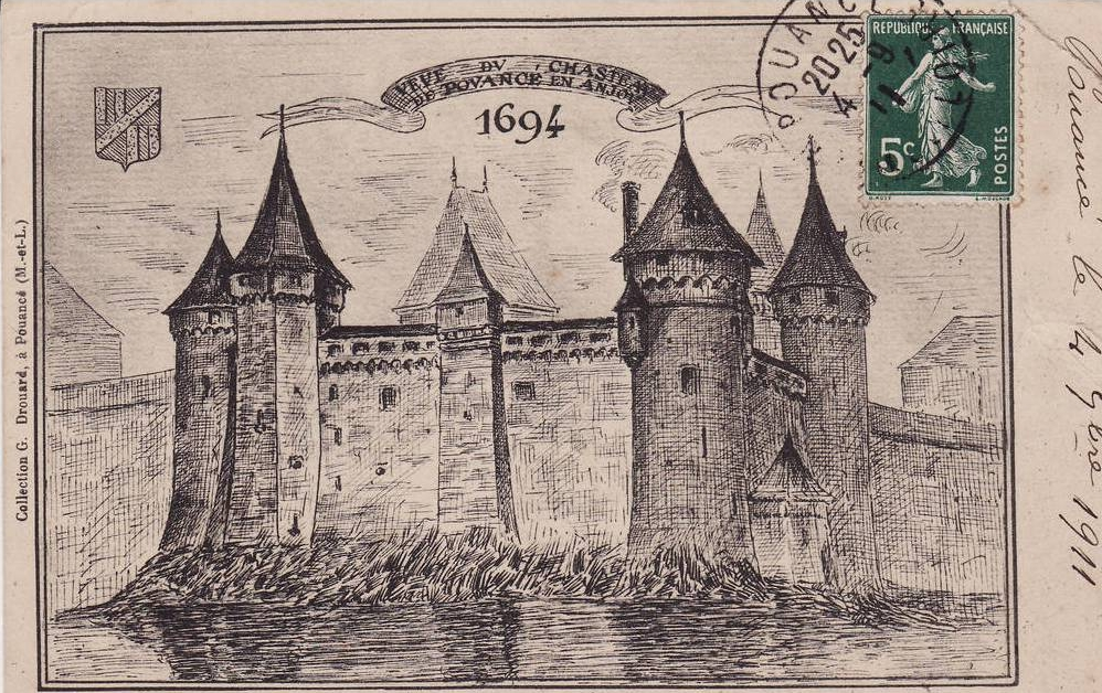 Reproduction d'une gravure du XIXe siècle représentant le château de Pouancé tel qu'il devait être au Moyen-âge.